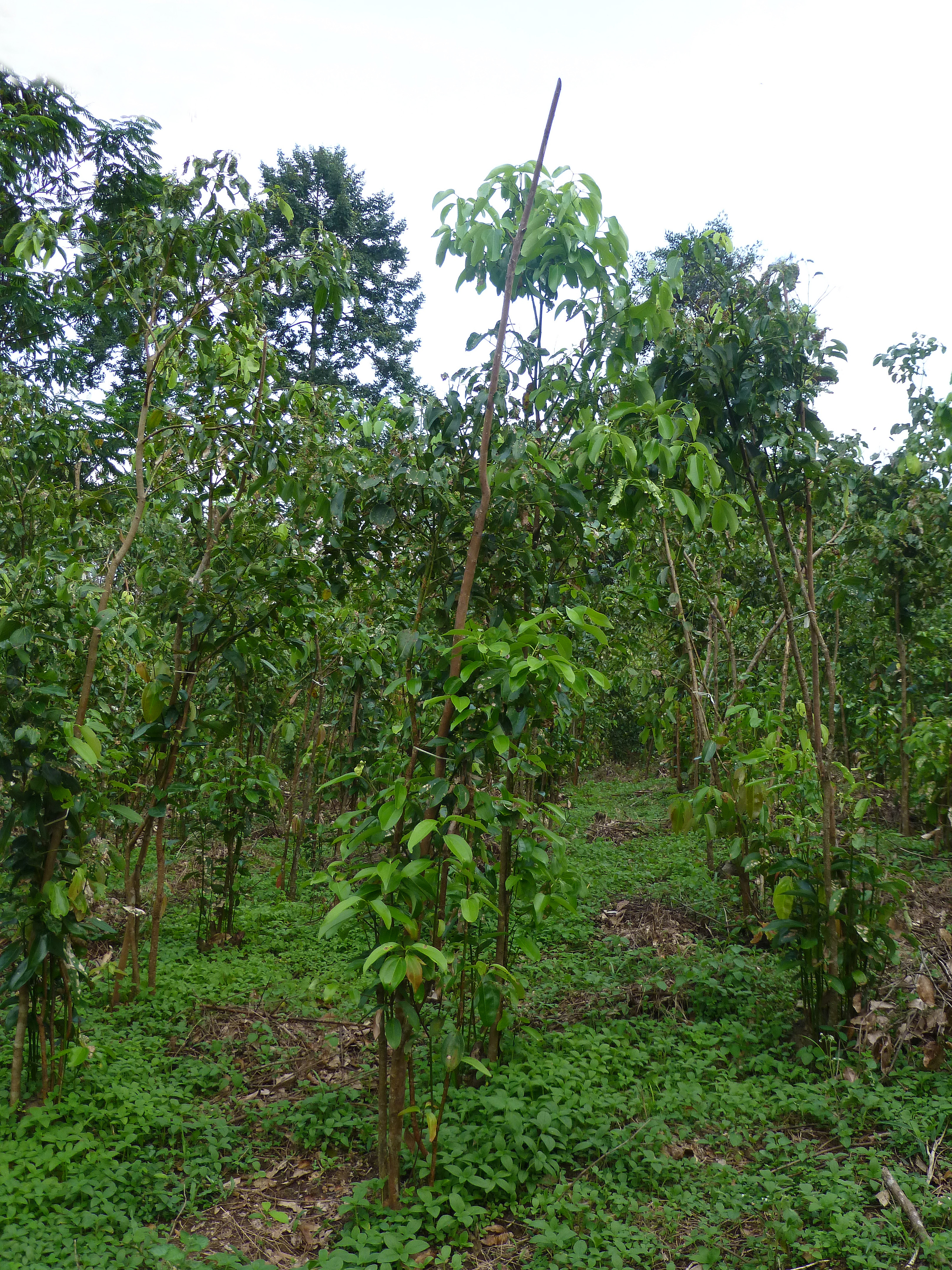 Canneliers de Ceylan (Cinnamomum verum) au Sri Lanka (Province du Sud)